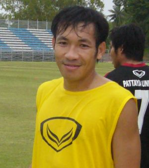 Niweat Siriwong